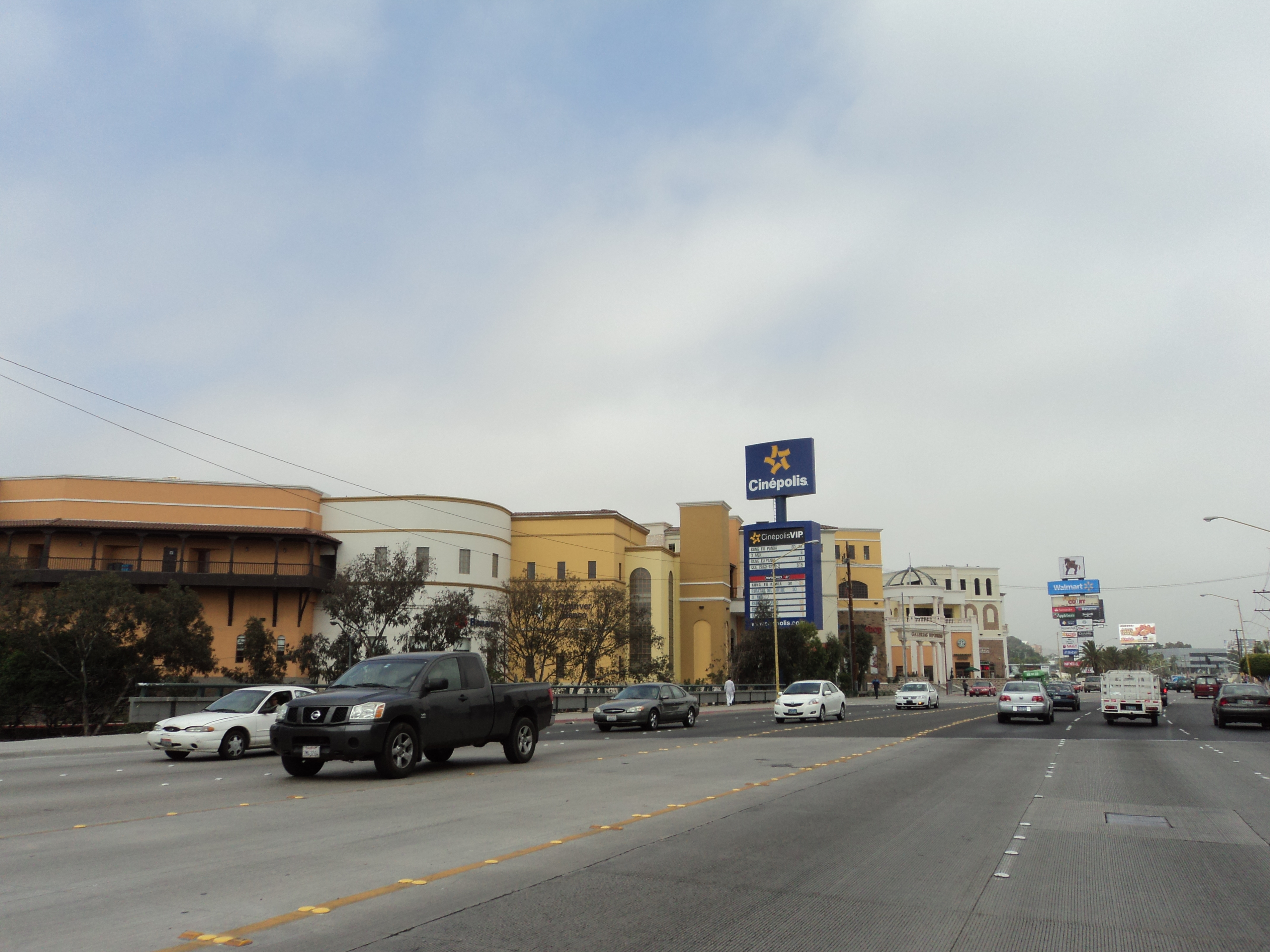 GALERIAS HIPODROMO